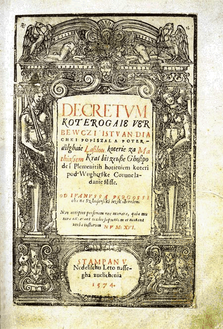 Decretum 1574.